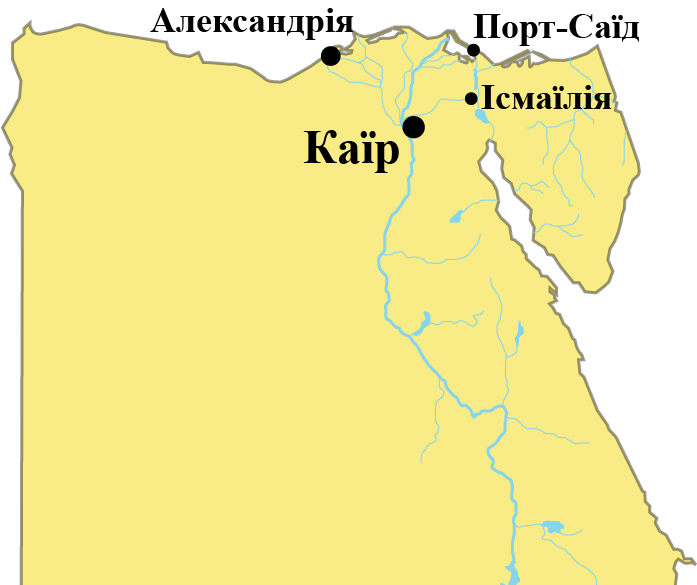 CAN_2006_Egypt_venues_ukr.gif: Єгипетські міста, де відбувалися матчі Кубка африканських націй 2006 року